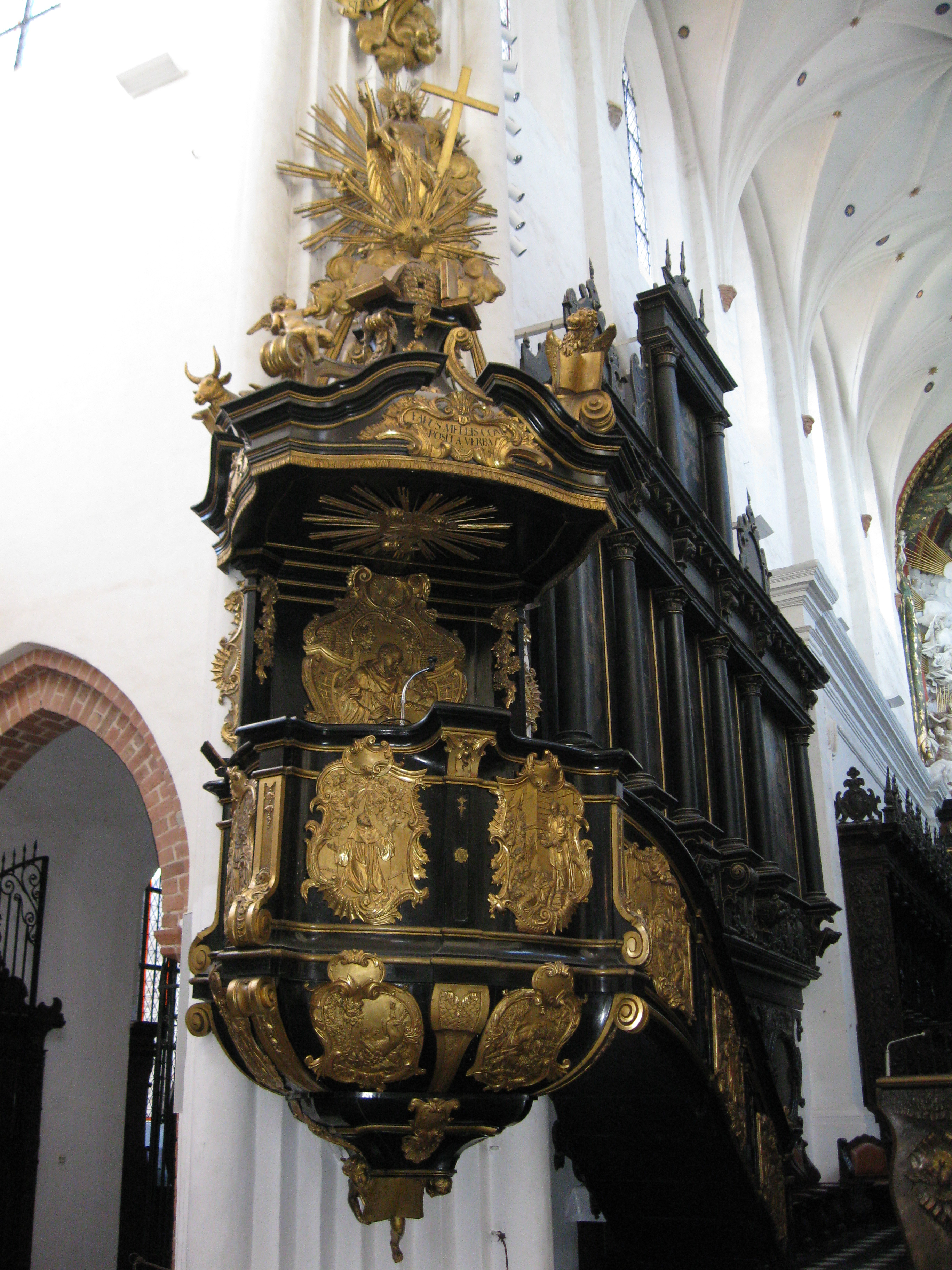 zespół pocysterski (kościół p.w. św. Trójcy (Katedra Oliwska), klasztor i mur klasztorny, kaplica NMP, szafarnia, Dom Bramny (Dom Zarazy), Stary i Nowy Pałac Opatów, spichlerz opacki, stajnia-wozownia, palmiarnia, park opacki) (linki prowadzą do kategorii Commons dla poszczególnych obiektów) ul. Cystersów 15, Gdańsk